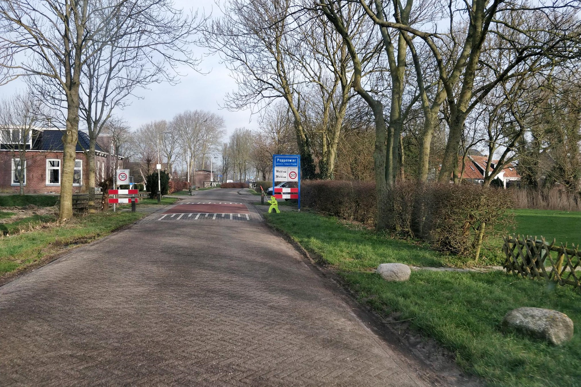 Poppenwier, weg Marsherne